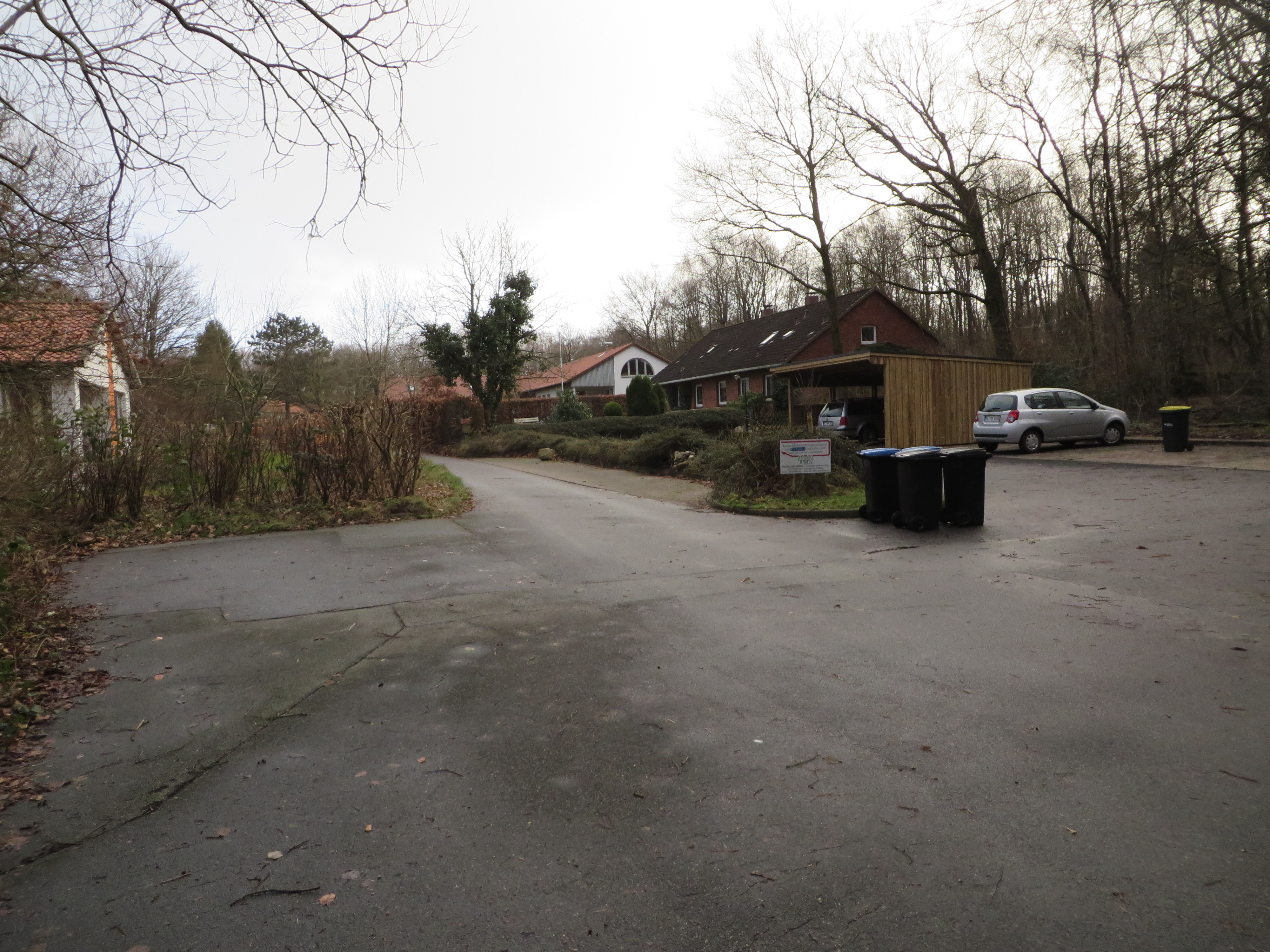 Waldsiedlung Tremmerup im Januar 2015, Bild 01